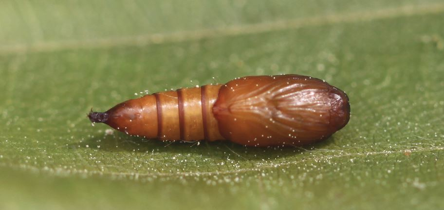 Archips xylosteana, 9 mm lange Puppe am 22. Mai 2020